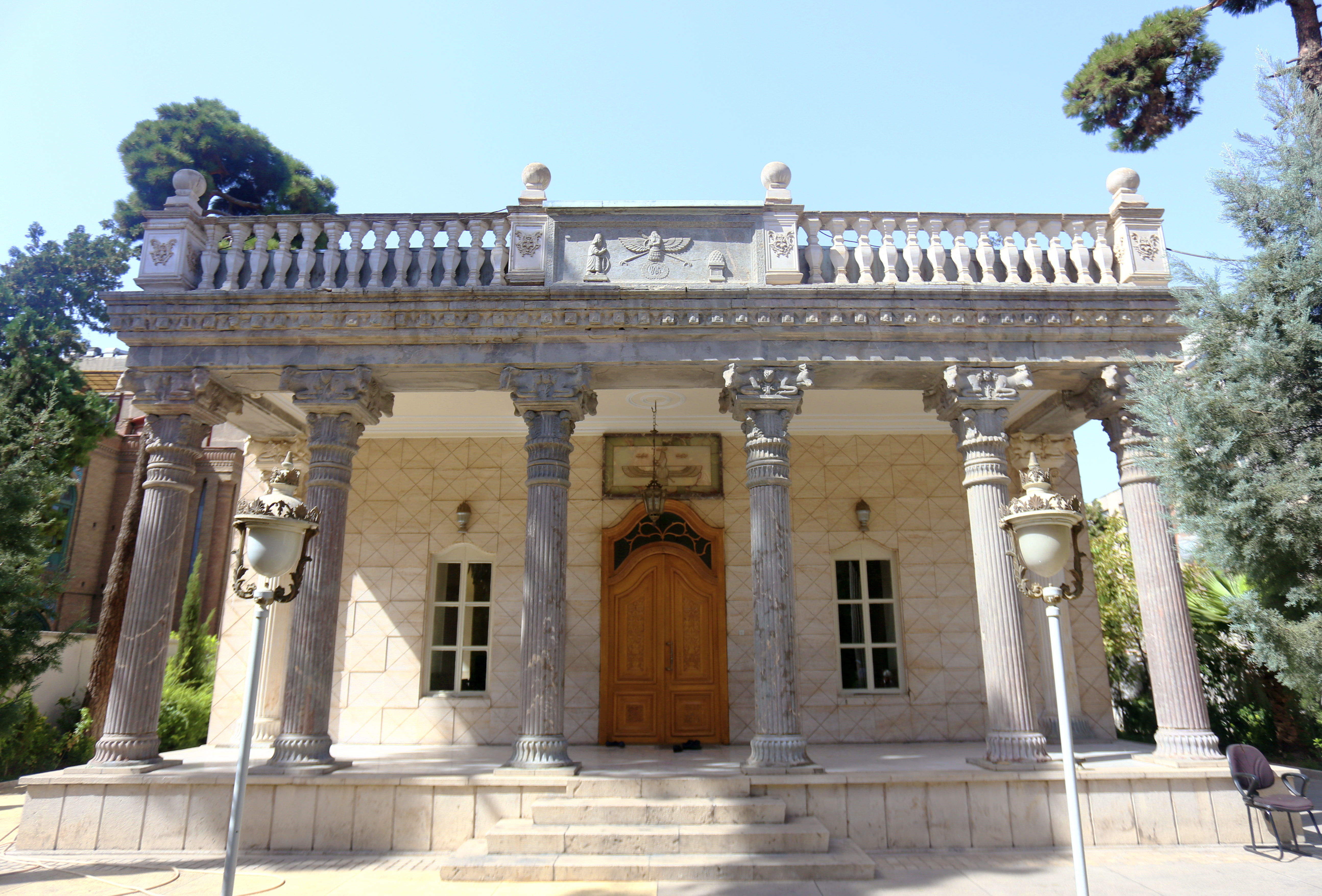 بنای معبد آدریان